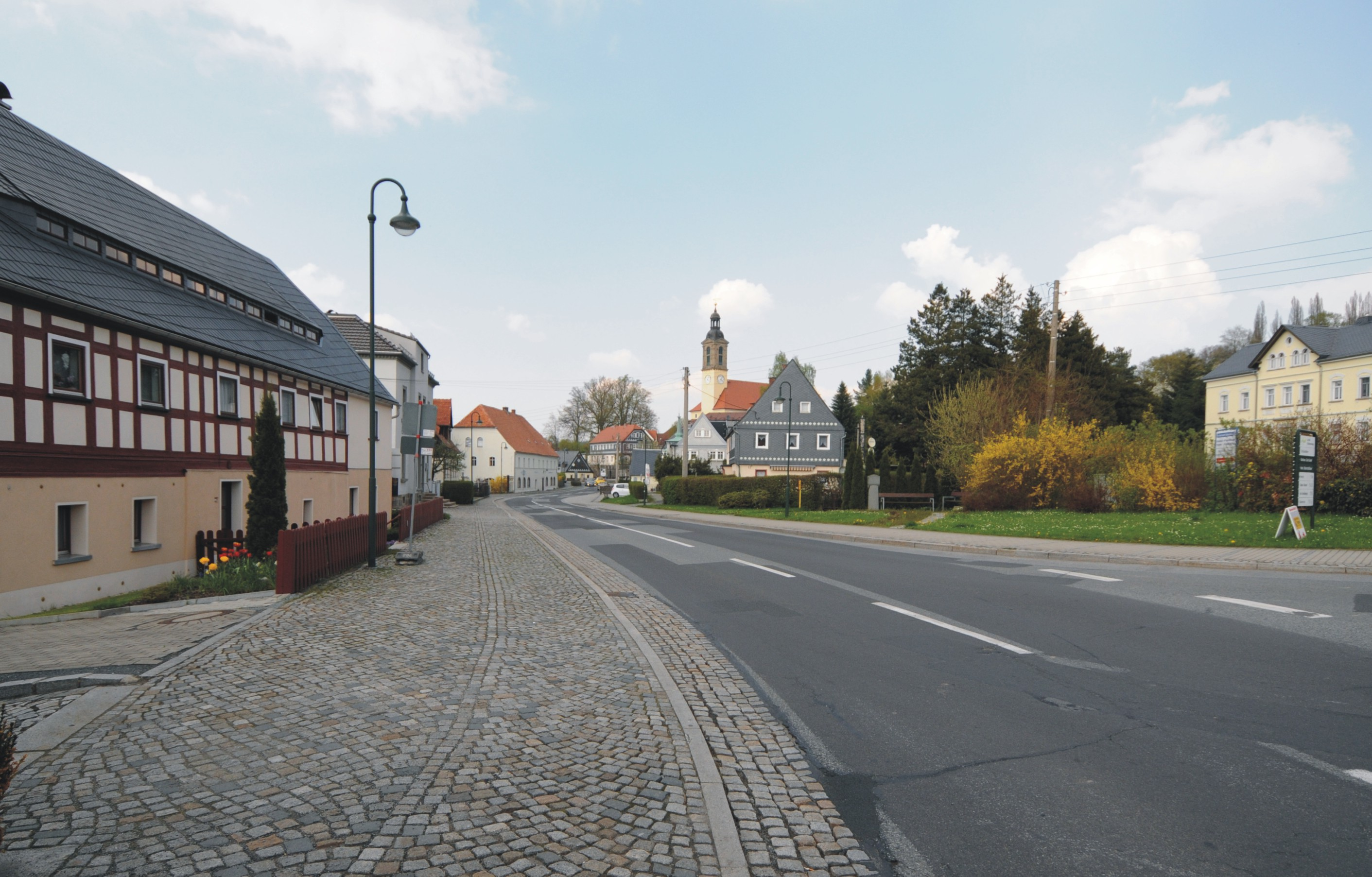 Sohland/Spree, Ortszentrum (Sachsen, Deutschland)